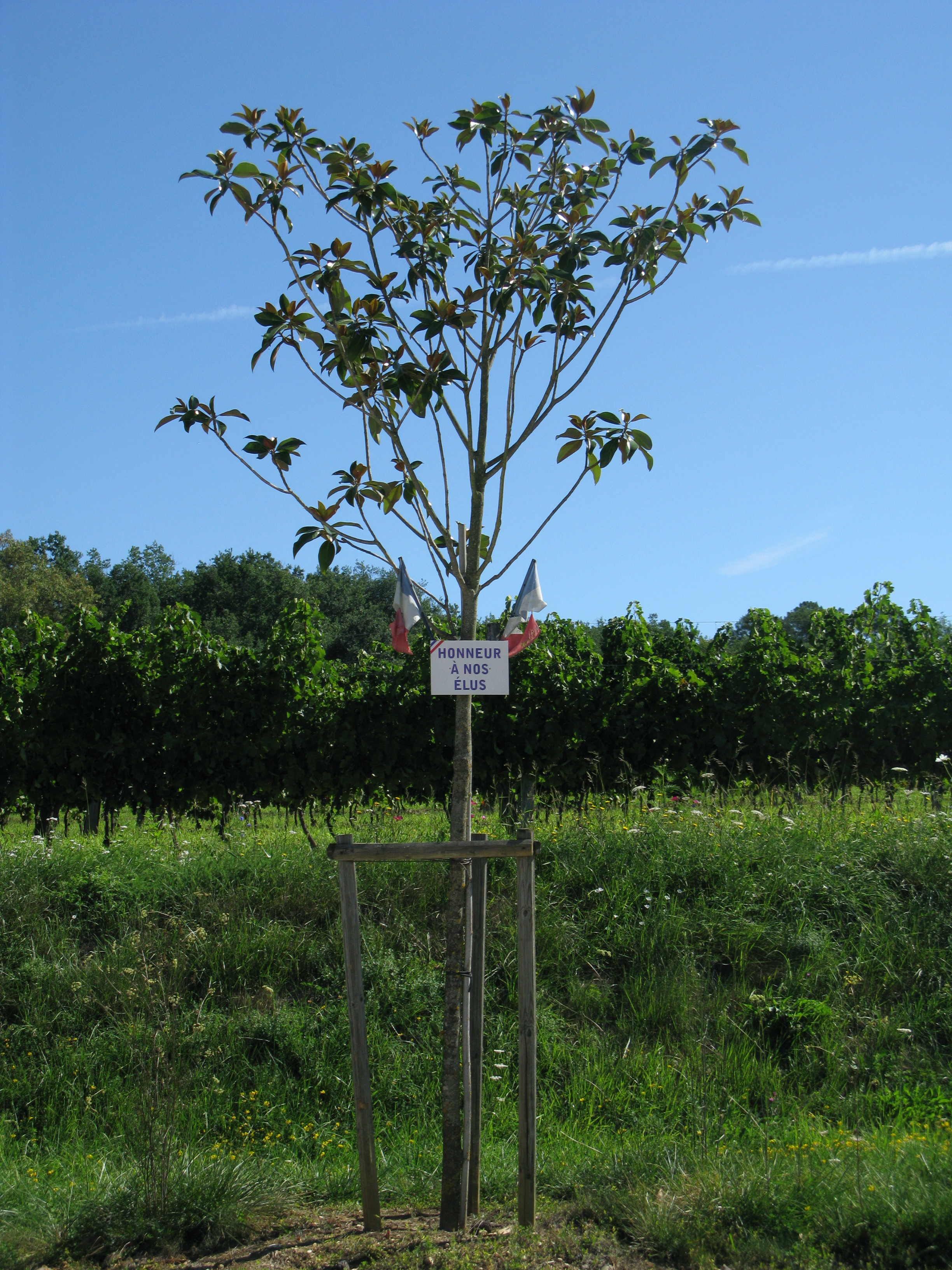 Arbre de Mai à Saint-Félix-de-Foncaude